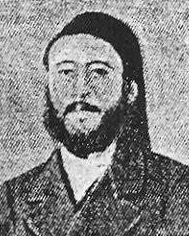 יעקב ולירו